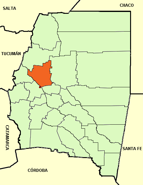 Mapa editado de: Santiago del Estero province (Argentina), departments and capital.png